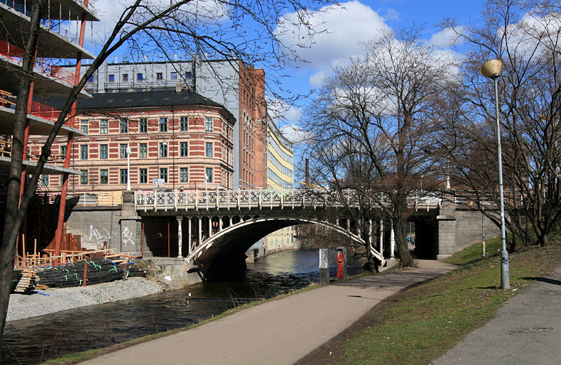 Hausmanns bru.